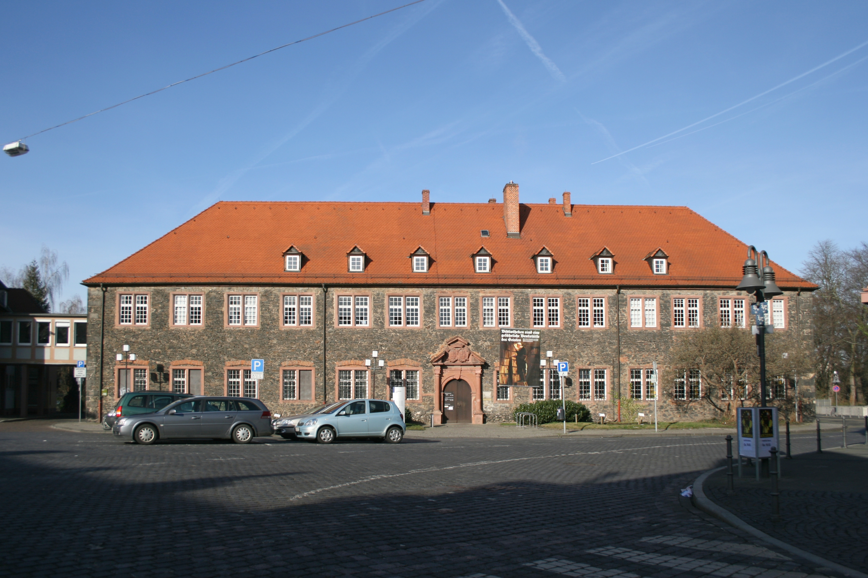 Stadtschloss Hanau, Ansicht des Kanzleigebäudes vom Schlossplatz aus.